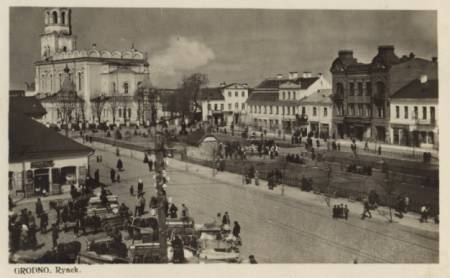 Беларуская (тарашкевіца): Выява Савецкай плошчы, пачатак 20 ст. у Гродне